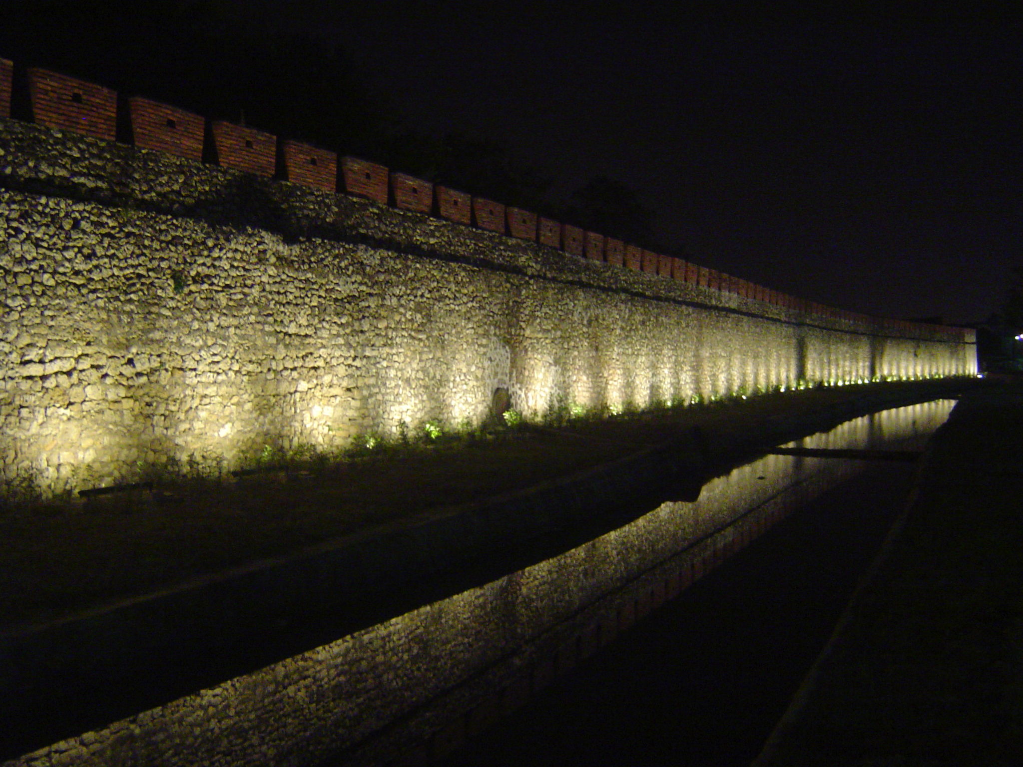 高雄市左營區鳳山縣舊城東門城牆夜景。